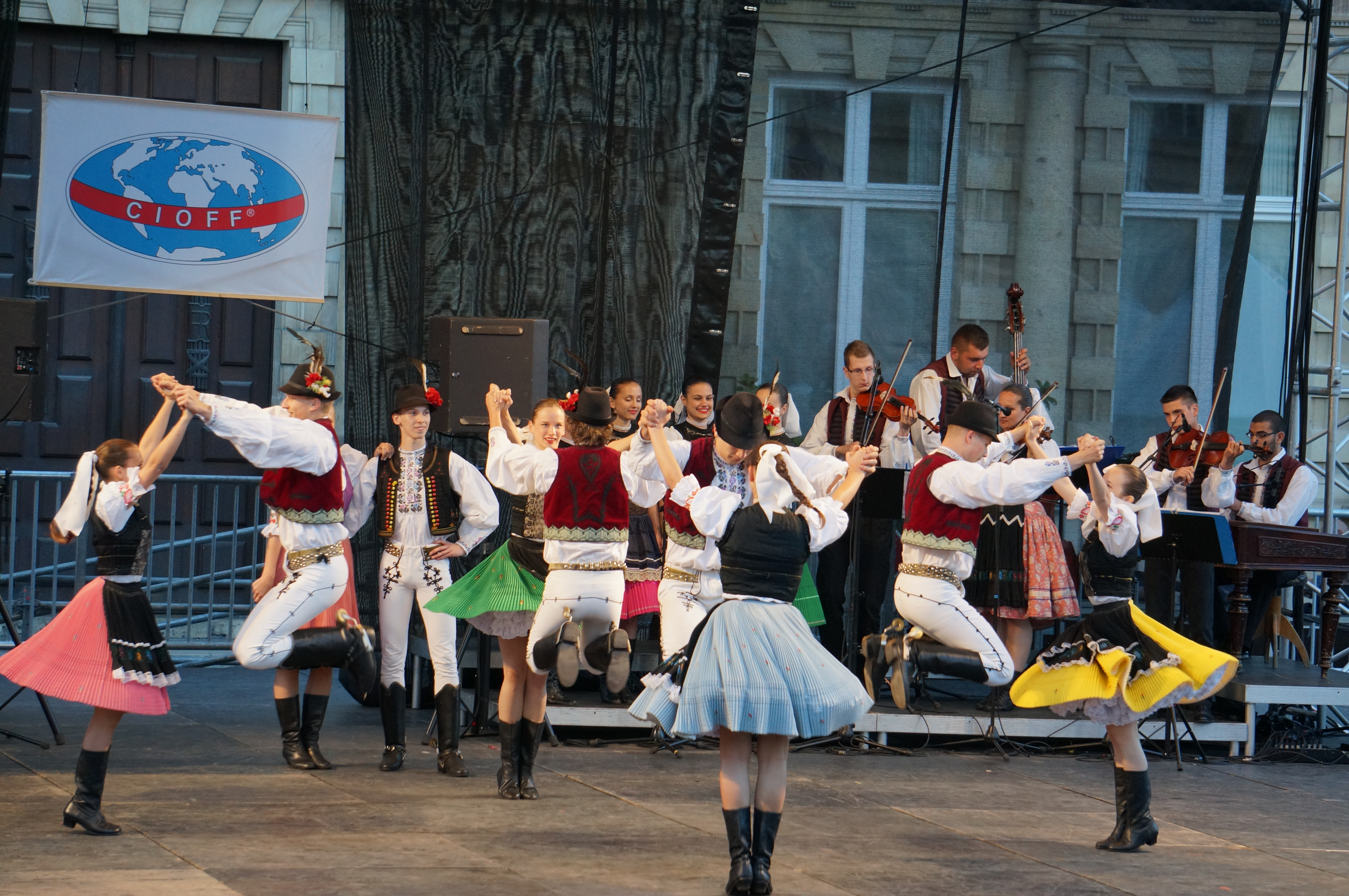 La Slovaquie lors des sacres du folklore.